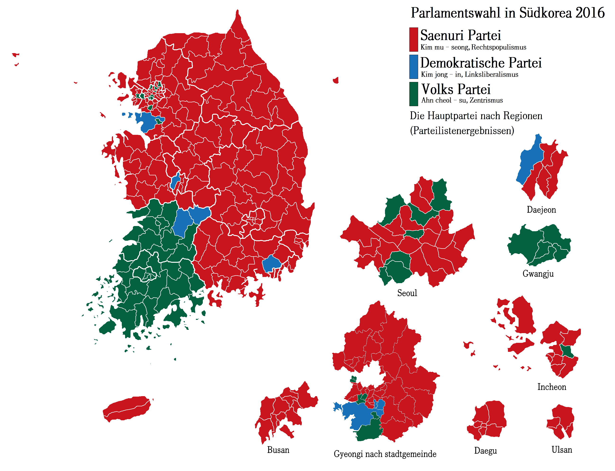 Ergebnis der Parlamentswahlen in Südkorea 2016 von Gemeinde